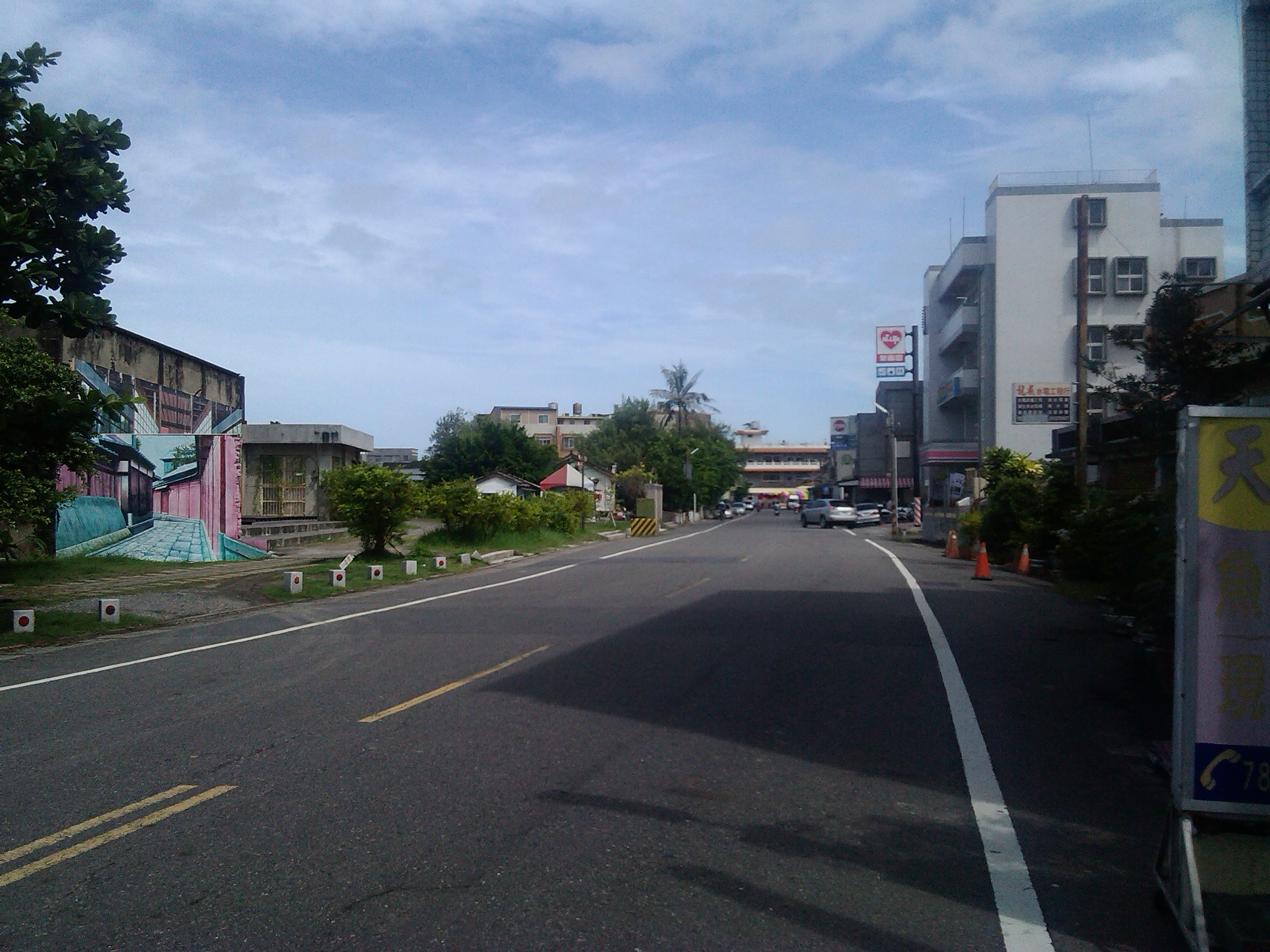 北門區舊程路(遊客中心旁)